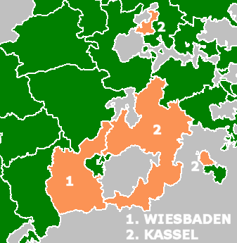 Regierungsbezirke in Hessen-Nassau 1878